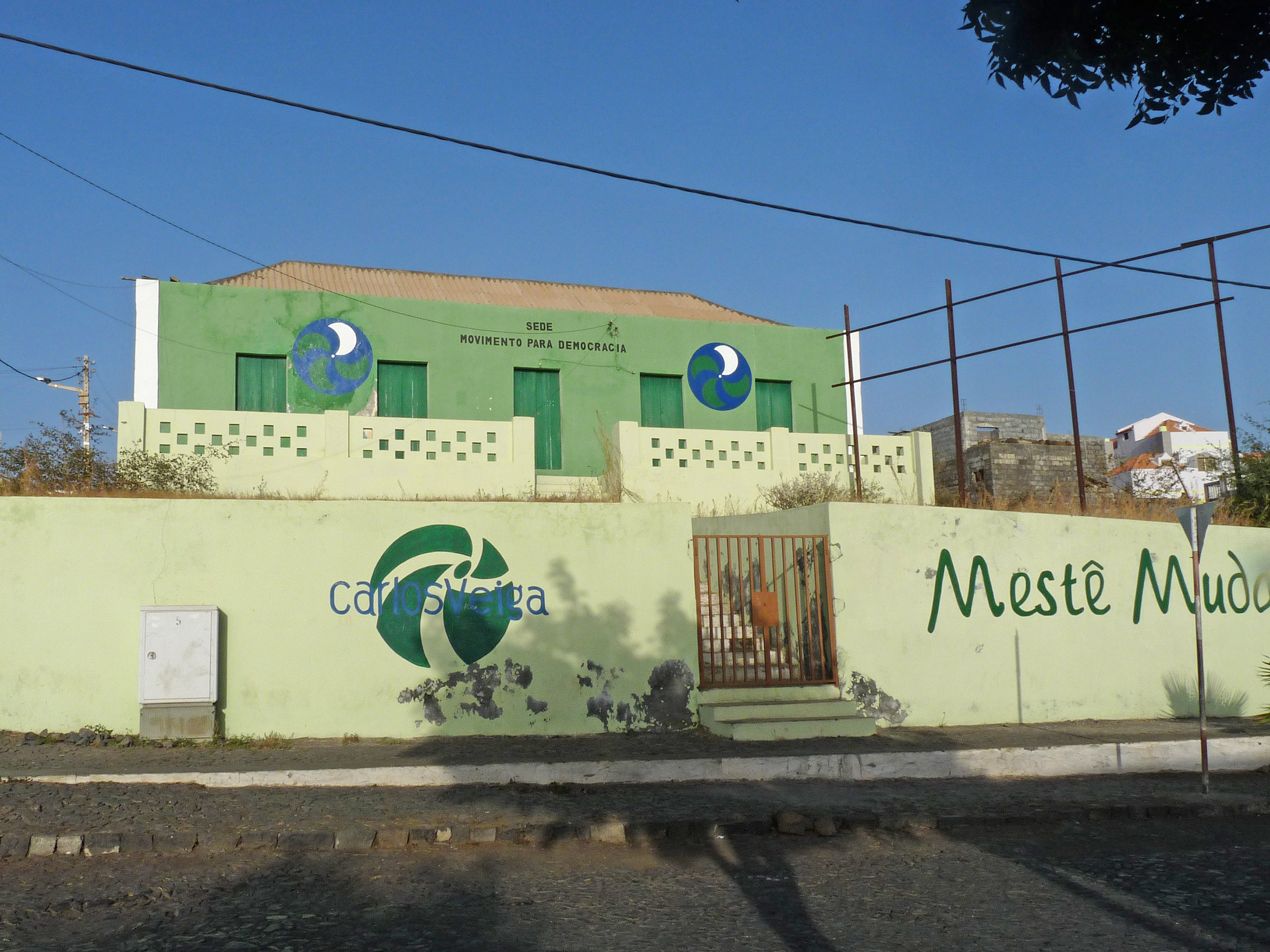 São Filipe (île de Fogo, Cap-Vert) : siège du Movimento para Democracia (MpD)